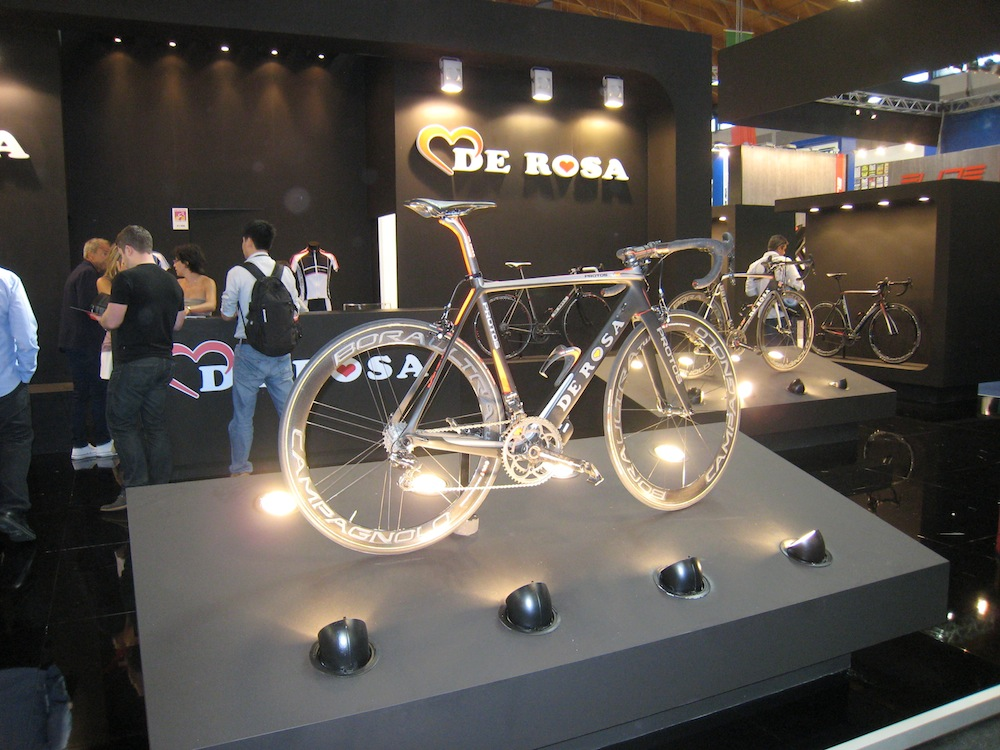 Де роза на вело выставке Евро байк.